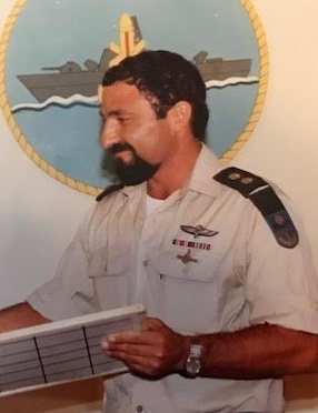 סא"ל אריה גביש מפקד פלגת ספינות סער 31